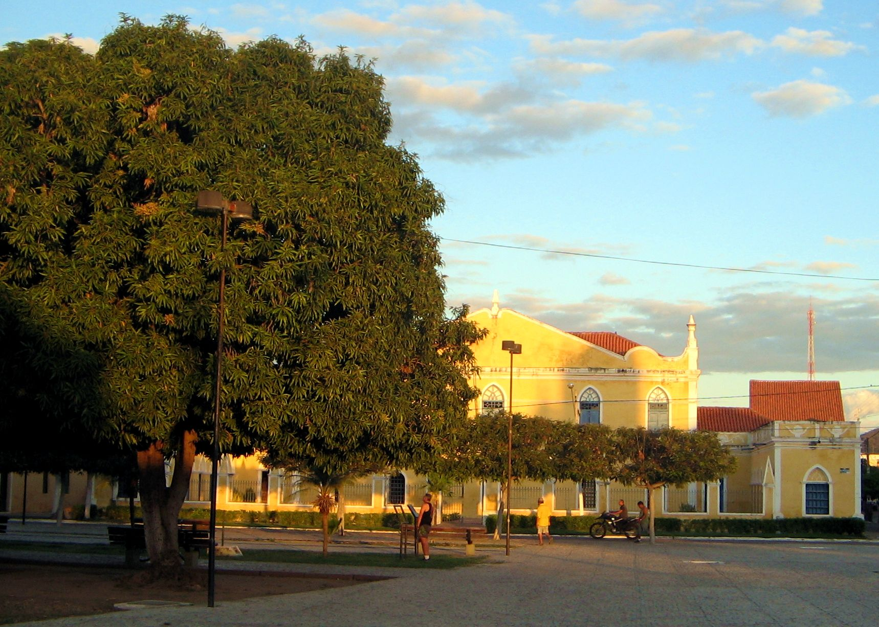 Prédio da antiga Casa de Câmara e Cadeia na Praça da Matriz; Icó/CE; Largo do Theberge.